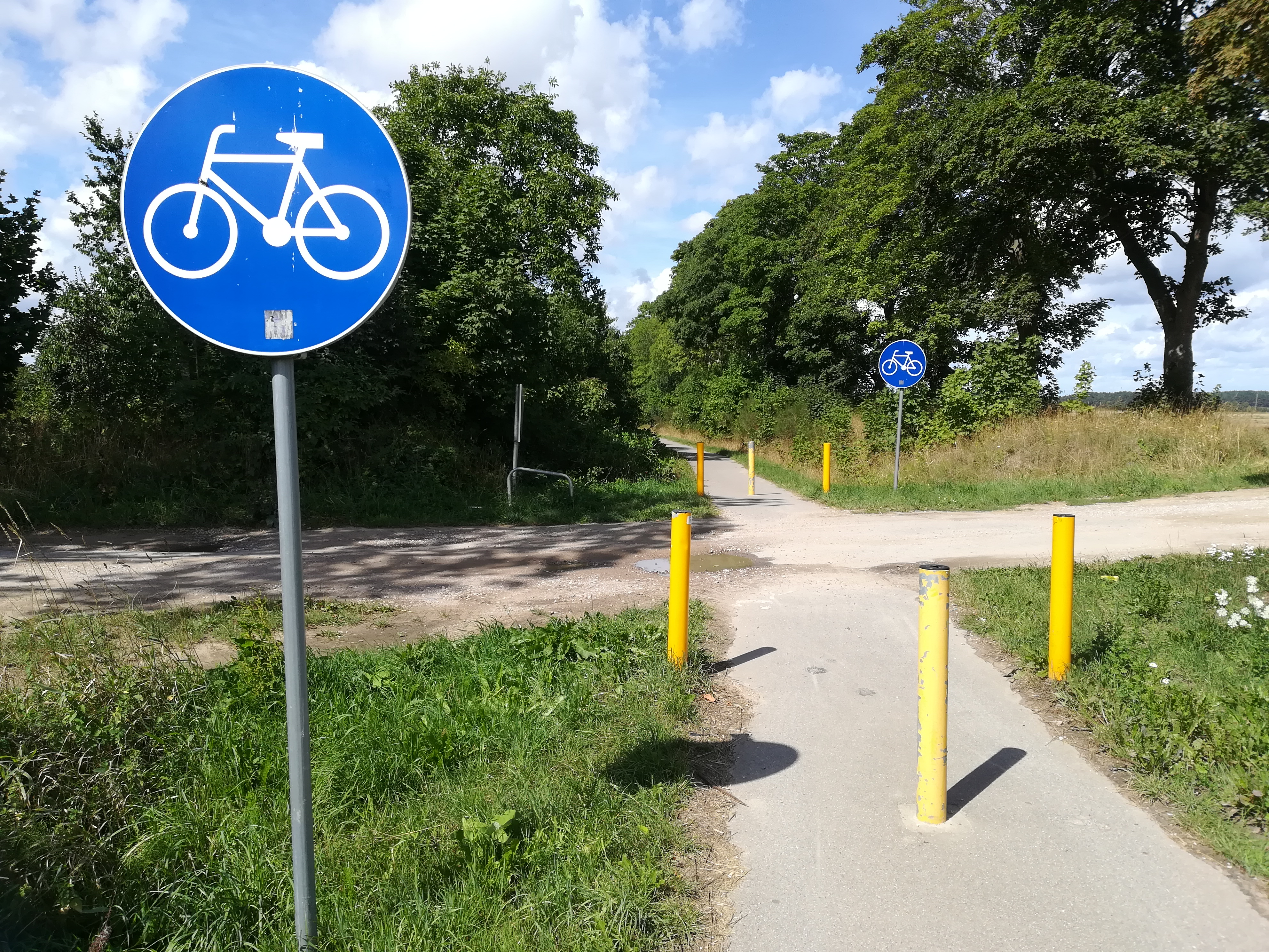 Ścieżka rowerowa po dawnej linii kolejowej Swarzewo - Krokowa.